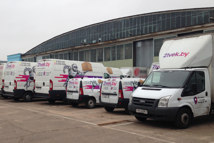 фото автопарка компании 21vek.by